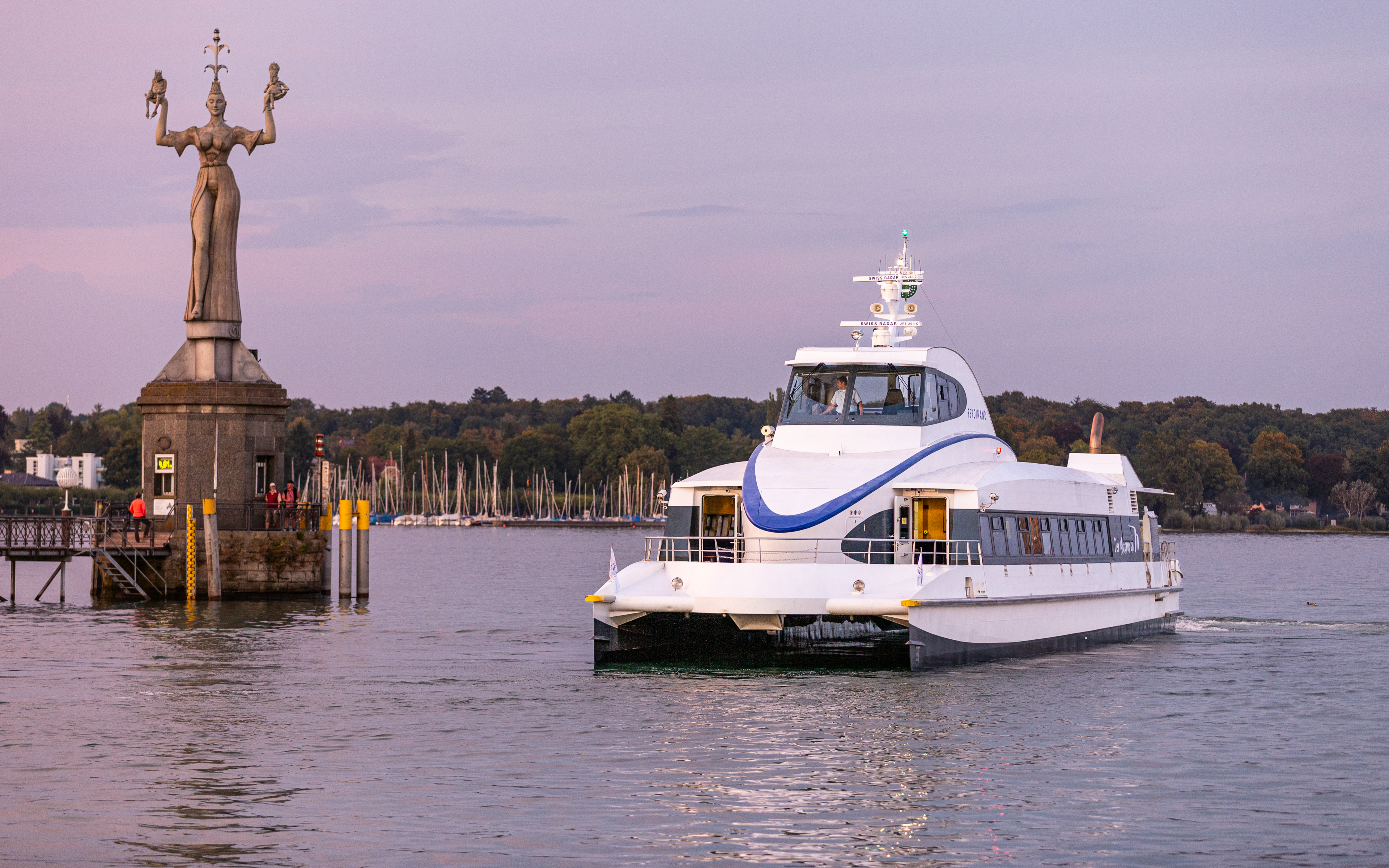 Katamaran "Ferdinand" abends in Konstanz